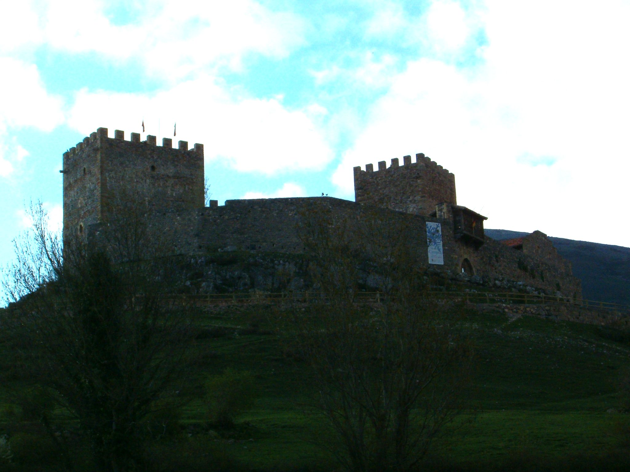 Castillo de Argüeso en el pueblo de Argüeso en Cantabria (España).